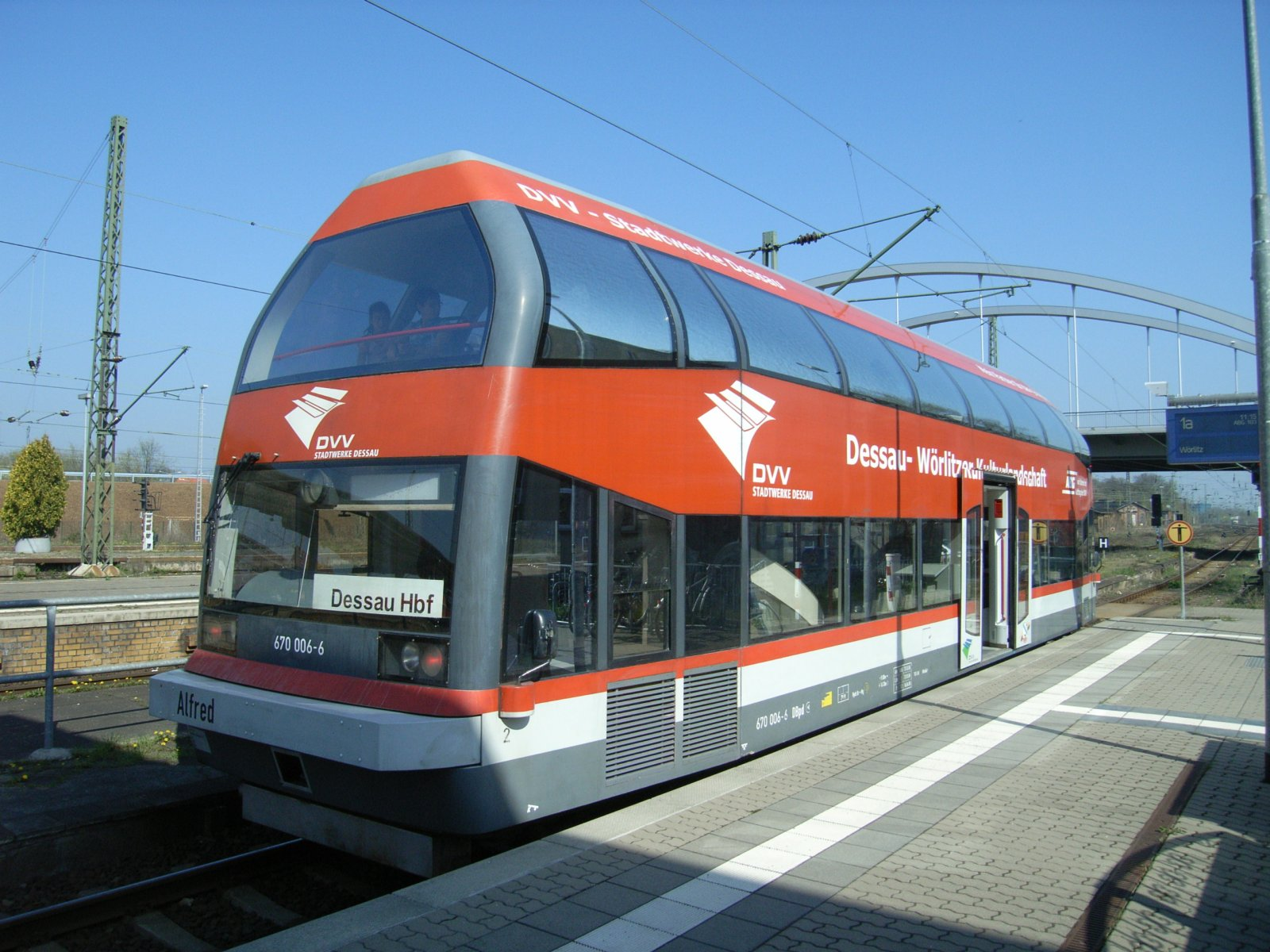 Doppelstockschienenbus der DWE Baureihe 670 am Bahnsteig 1 des Dessauer Hauptbahnhofs